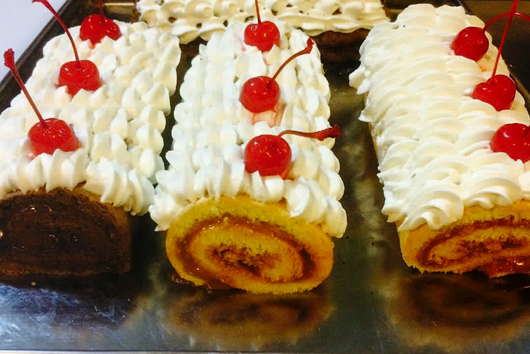 Versión jpg del archivo Archivo:Arrollados CR.png